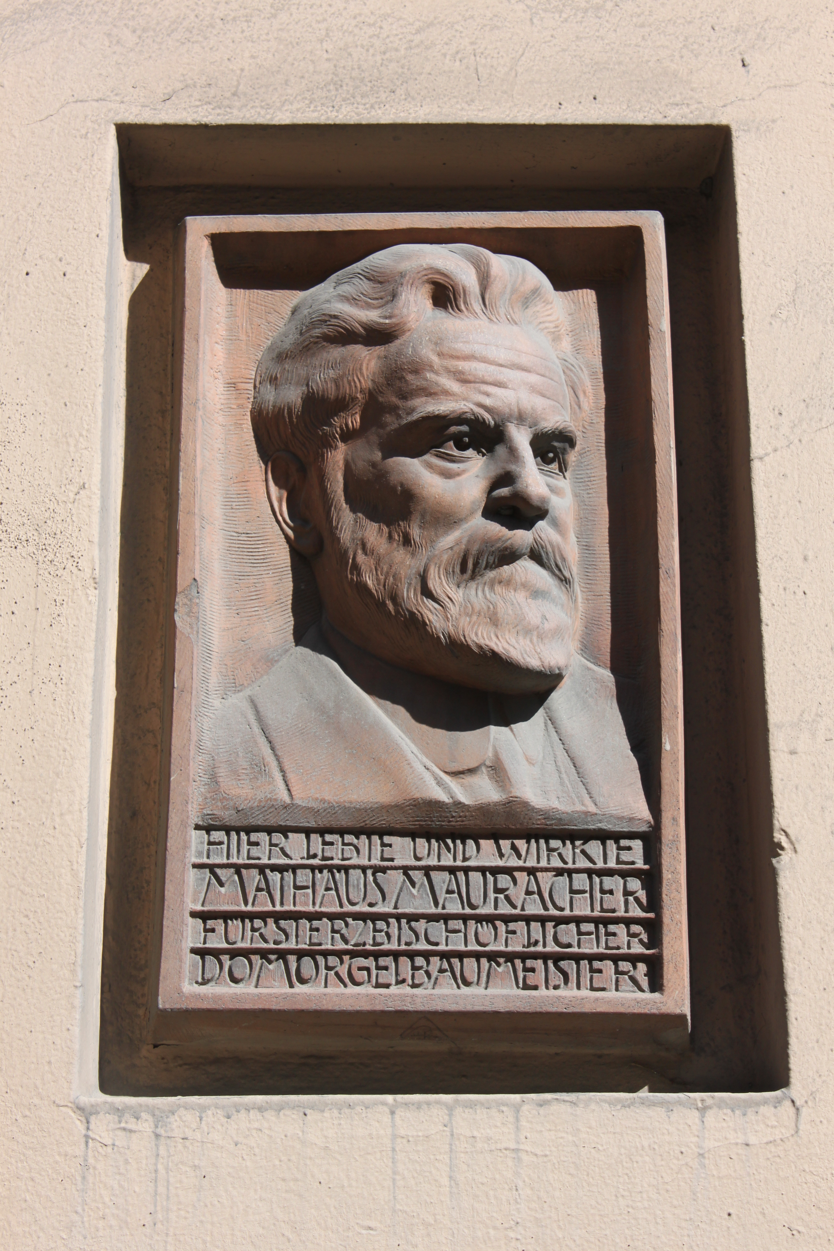 Hier lebte und wirkte Mathäus Mauracher Fürsterzbischöflicher Domorgelbaumeister, Keramikrelief am Haus Eberhard-Fugger-Straße 22 in Salzburg, nähe Mauracherstraße